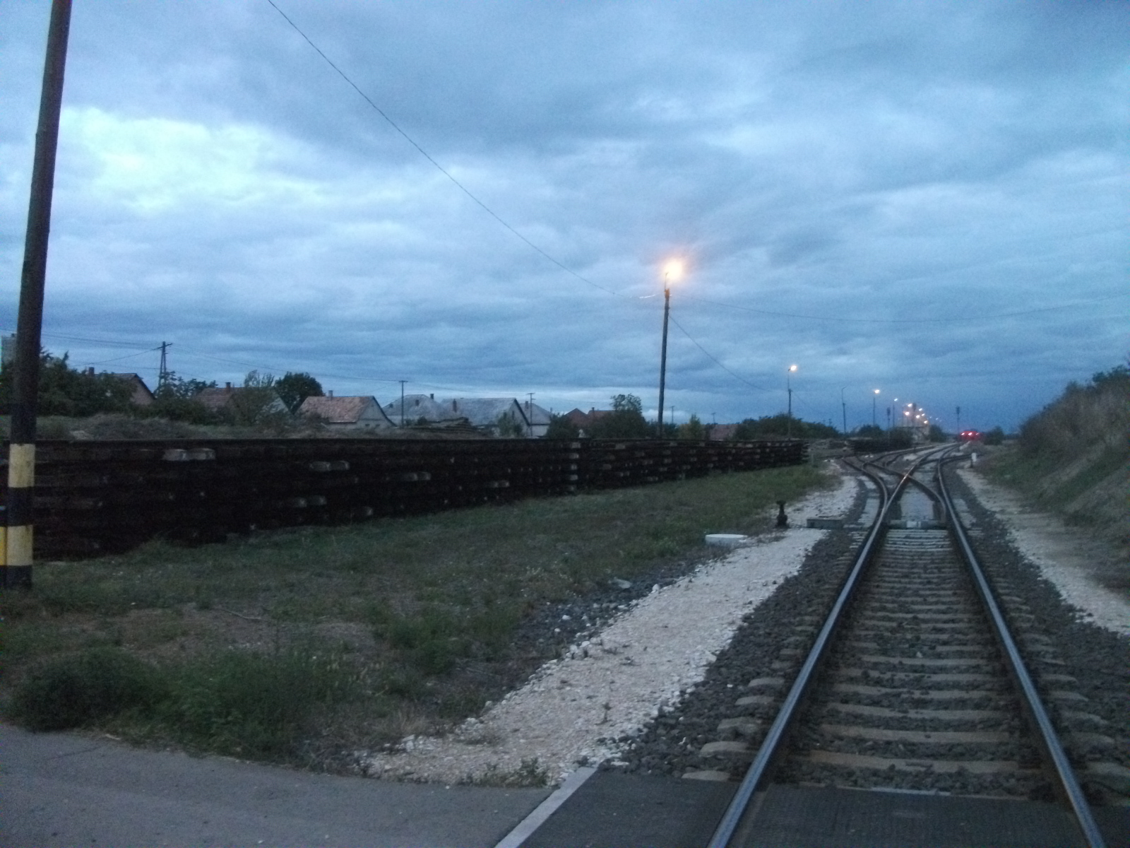 A Pusztaszabolcs–Székesfehérvár vasútvonal Zichyújfalunál. Bal oldalt a Magyar Állami Vasutak (MÁV) által hulladéknak minősített sínszálak láthatók.